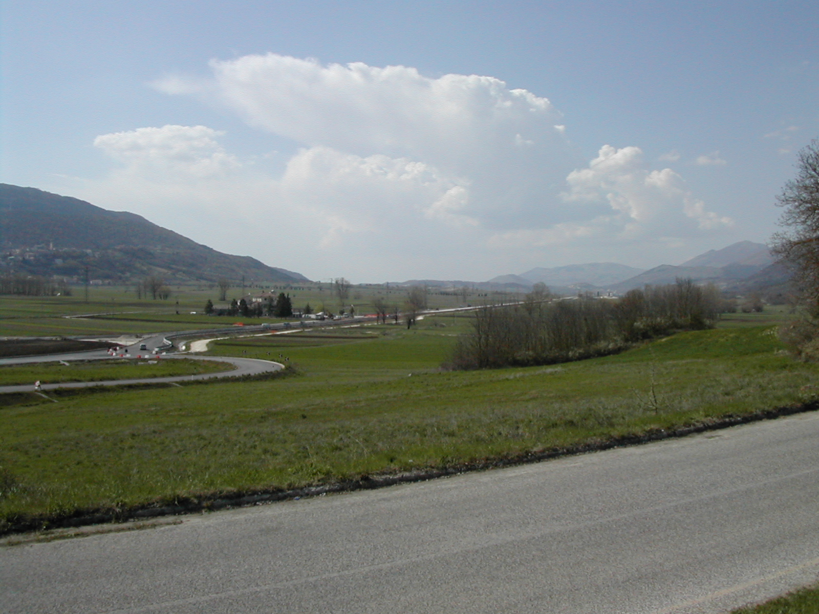 Piano di Navelli provincia de l'Aquila SS17